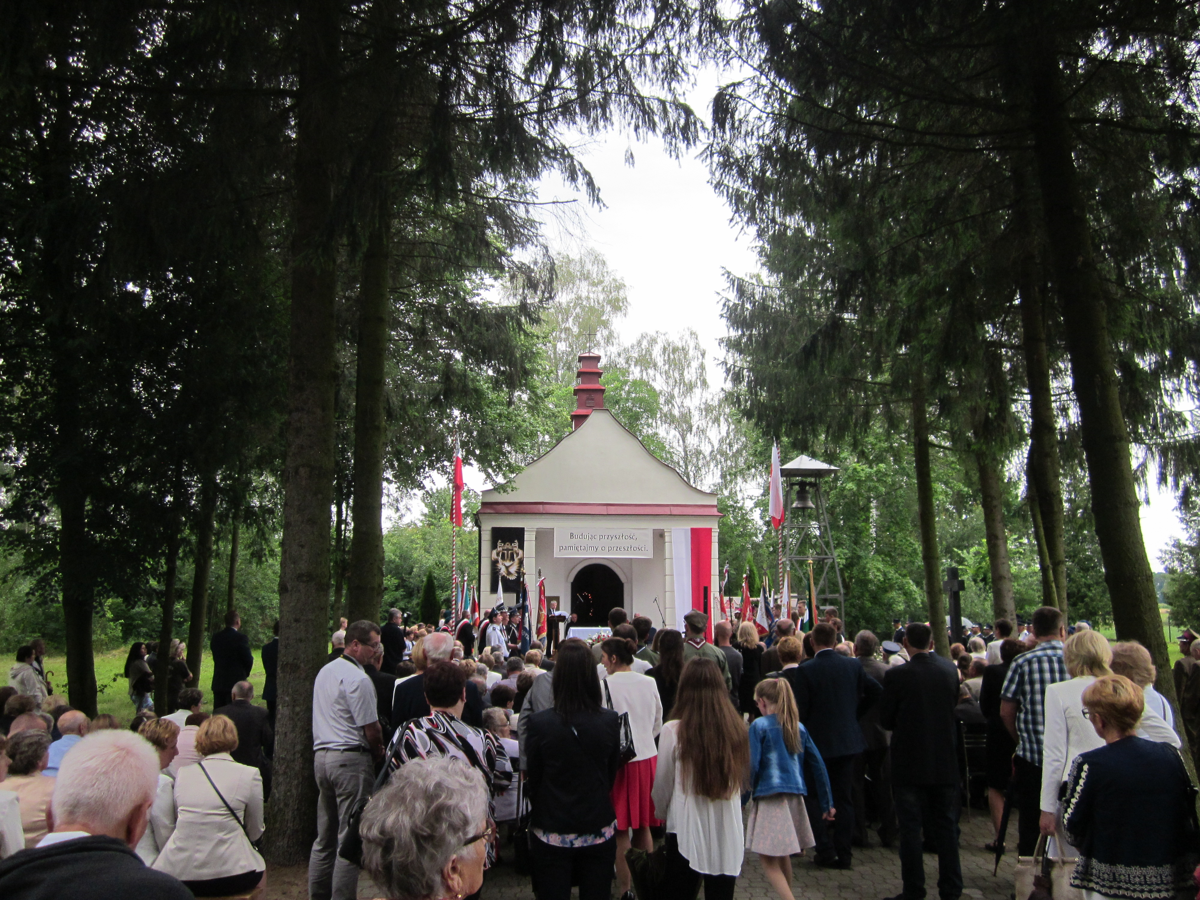 fotografia została zrobiona podczas uroczystości upamiętniającej 73 Rocznice Mordu Mieszkańców wsi Krasowo-Częstki w dniu 17 lipca 2016 roku.